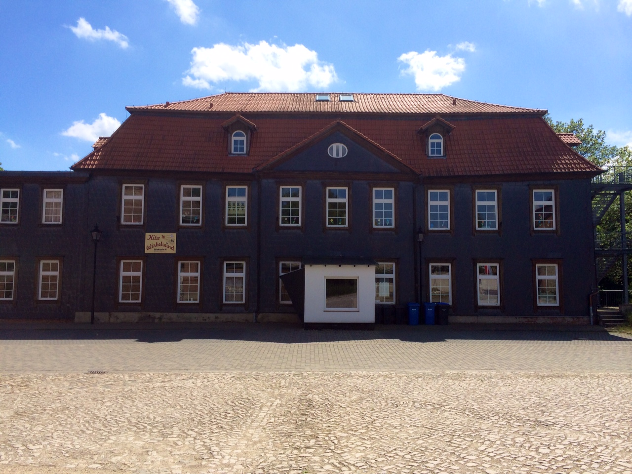 Rittergut, Schwanebeck